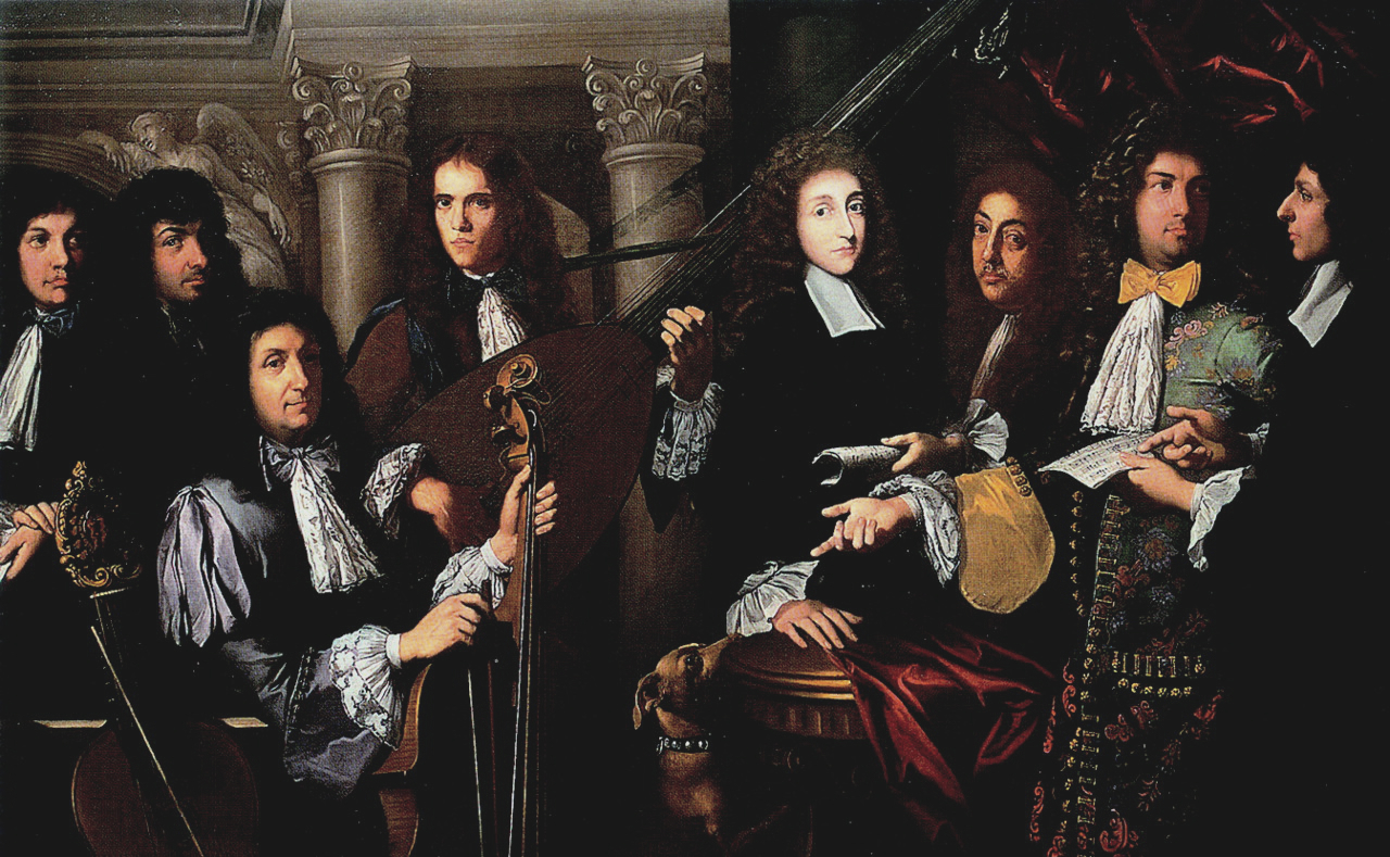 Il Prinicpe Ferdinando de' Medici con i suoi musici